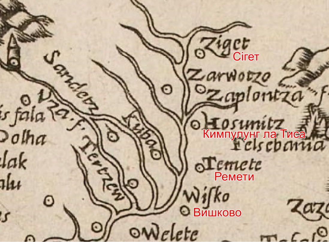 Nova_descriptio_totius_Hungariae-1559